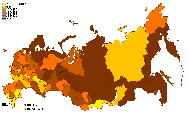 результаты ЛДПР на парламентских выборах 2011 года по регионам